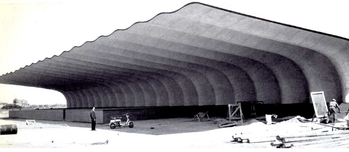 Pensilina di carico presso il Mercato Ortofrutticolo di Novoli, Firenze (oggi distrutta)